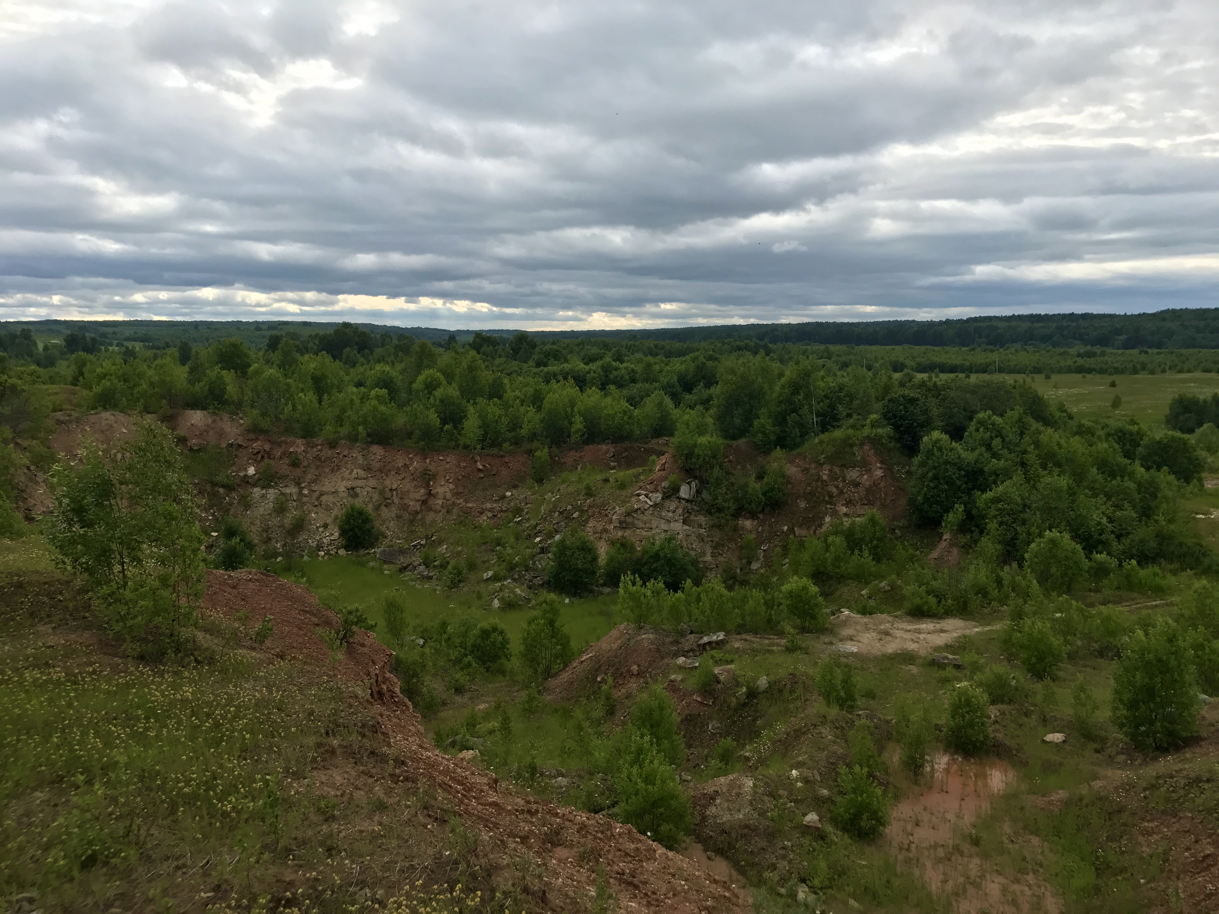 Карьер Воробьевский: 500 м выше по течению Волги, Старица, Старицкий район, Тверская область This image is related to the protected area of Russia number 6910893